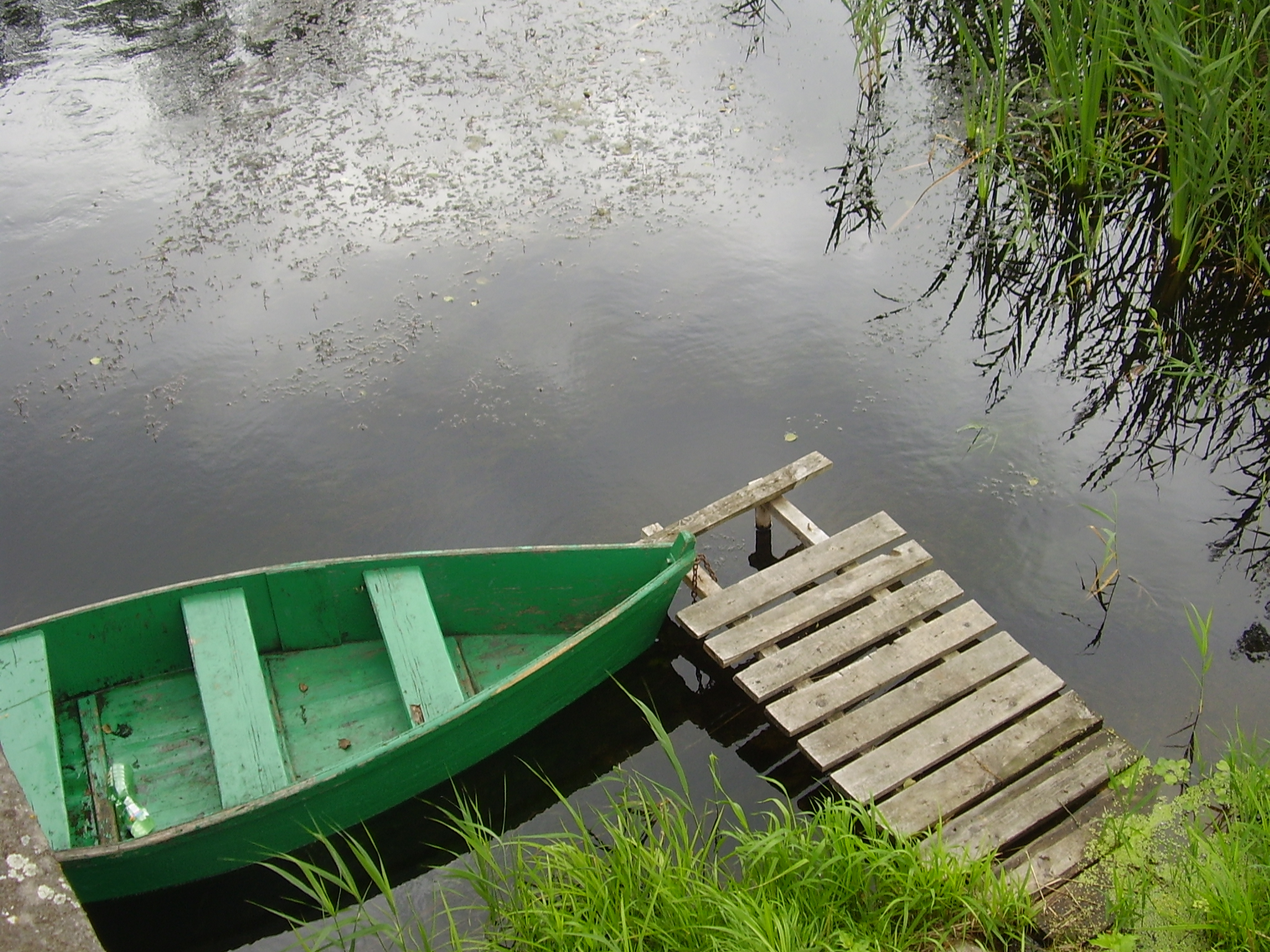 Łódź Rosocha sierpień 2013